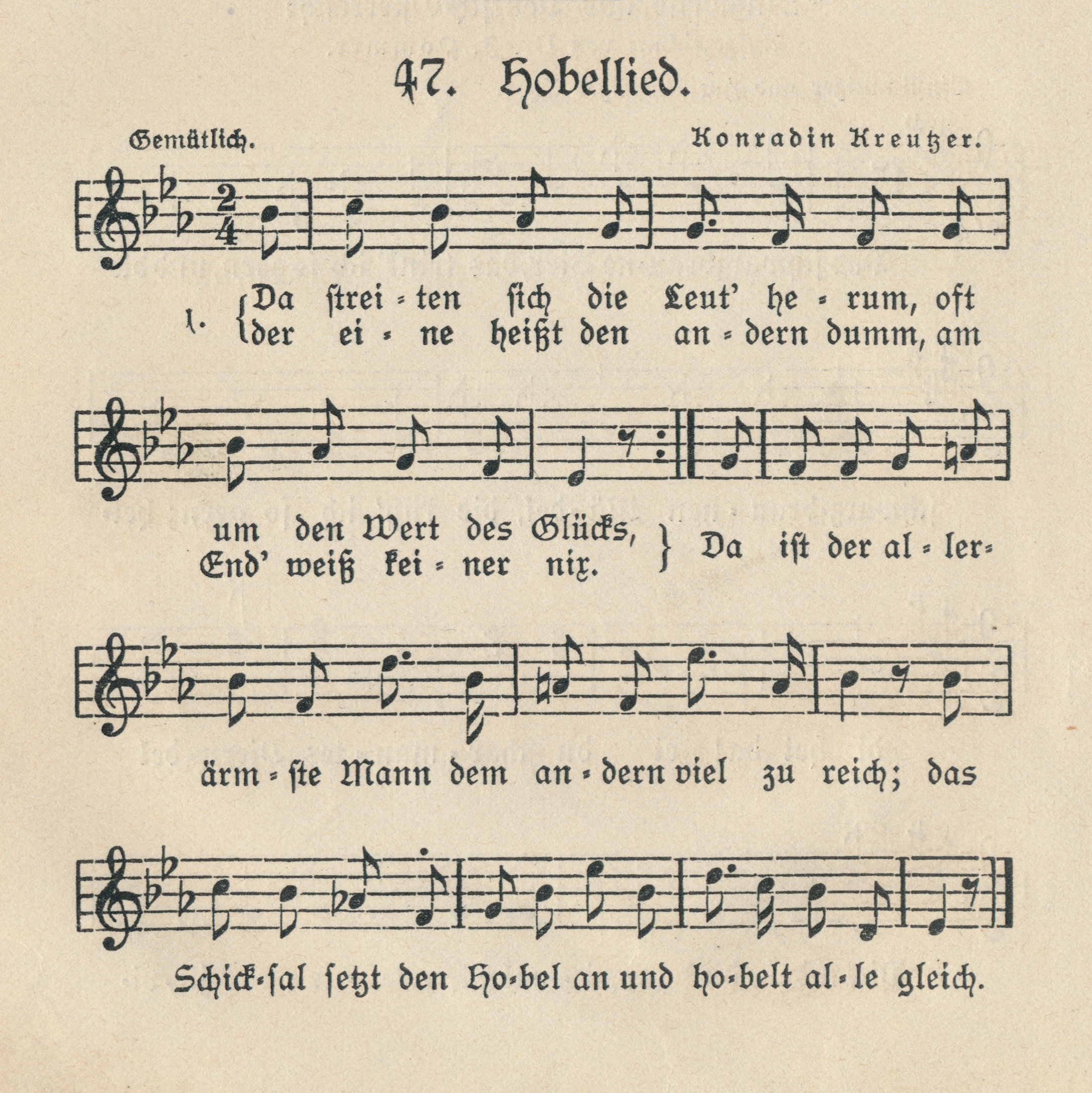 Das Hobellied aus Ferdinand Raimunds Verschwender (Noten und erste Strophe)